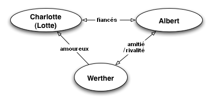 Auteur du fichier : Thorben Bochenek (Tobo) (cf Description : graphique traduit par The Dav21 sur les relations dans le roman de Goethe Les souffrances du jeune Werther